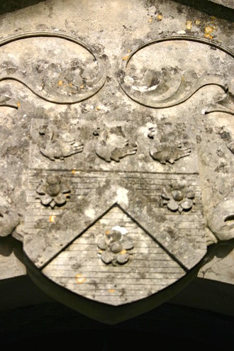 Fronton de la chapelle de Boisrenard.